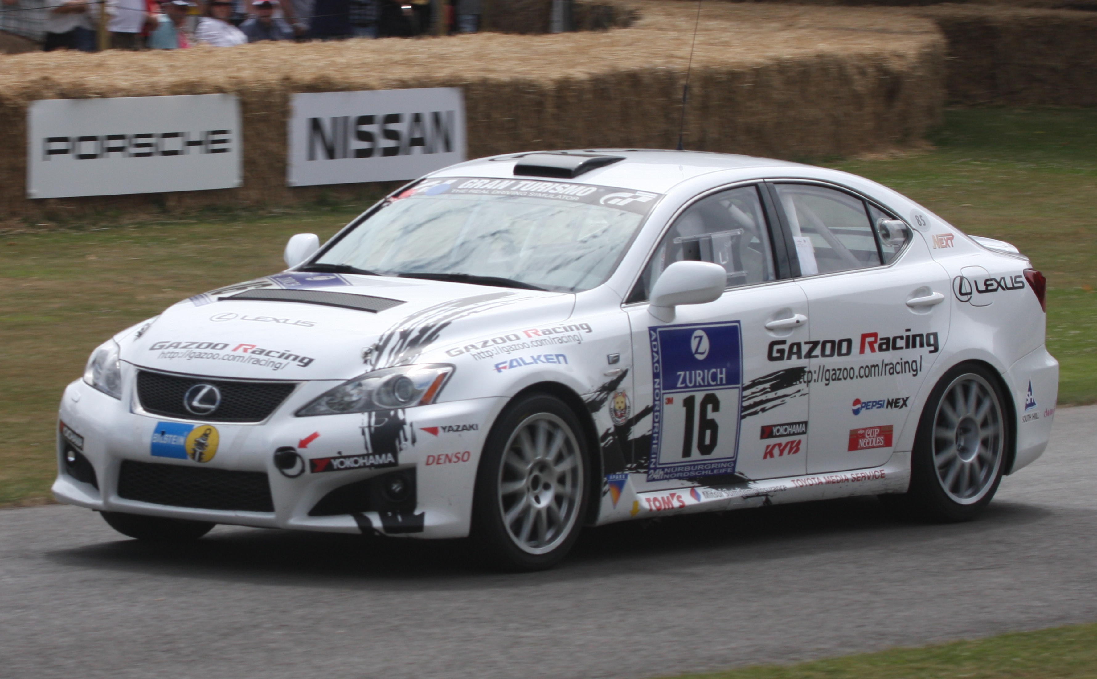 Lexus IS-F